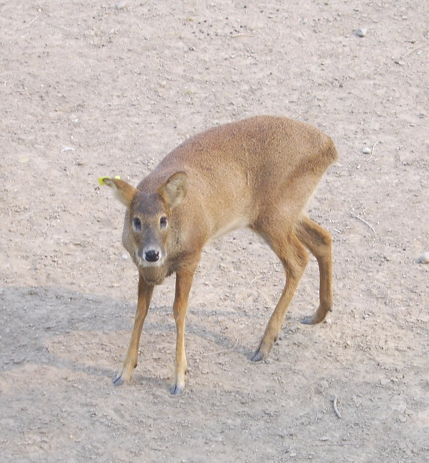 獐，于北京麋鹿苑